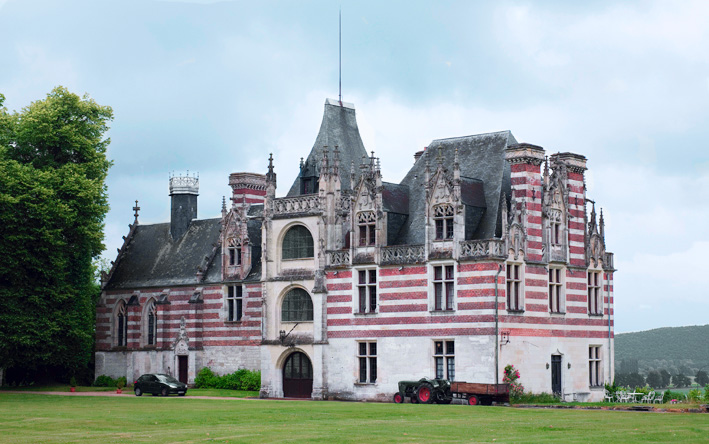 Nordwest-Ansicht des Schlosses Ételan .